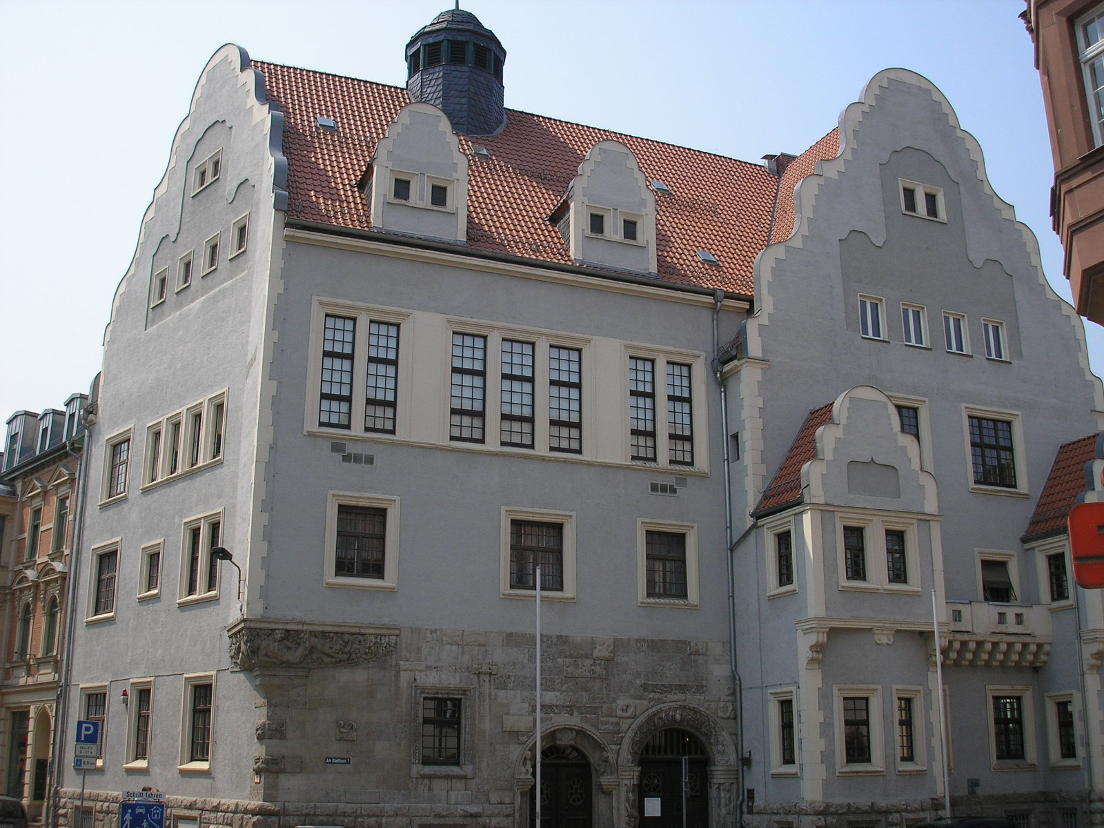 Stadthaus von Apolda (Thüringen) - alte Sparkasse.